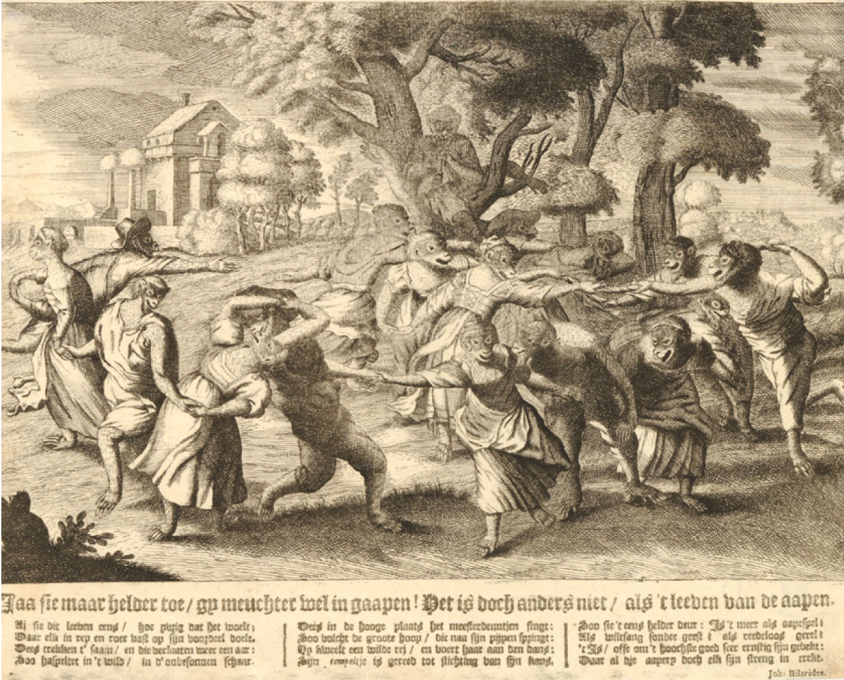 Prent van Johannes Hilarides (Amsterdam, ca. 1700). Parodie op Rubens' Dans van dorpelingen en mythische figuren (1635). De tekst vangt aan: "Jaa sie maar helder toe / gy meuchter wel in gaapen! Het is doch anders niet / als 't leeven van de aapen"